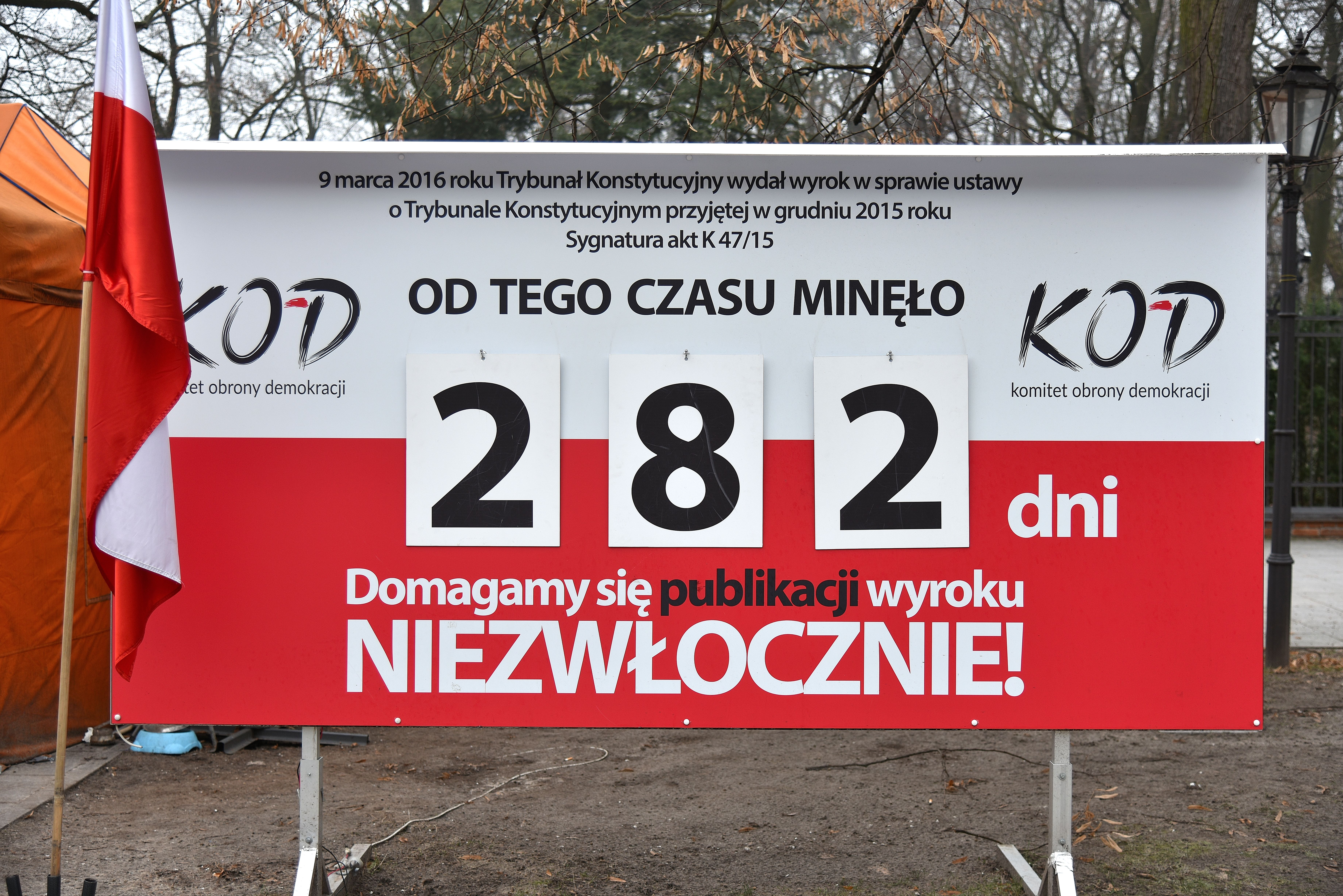 Tablica ustawiona przed gmachem Kancelarii Rady Ministrów pokazująca czas wstrzymywania przez Prezes Rady Ministrów Beatę Szydło wyroku Trybunału Konstytucyjnego z 9 marca 2016 r. (sygn. akt K 47/15)